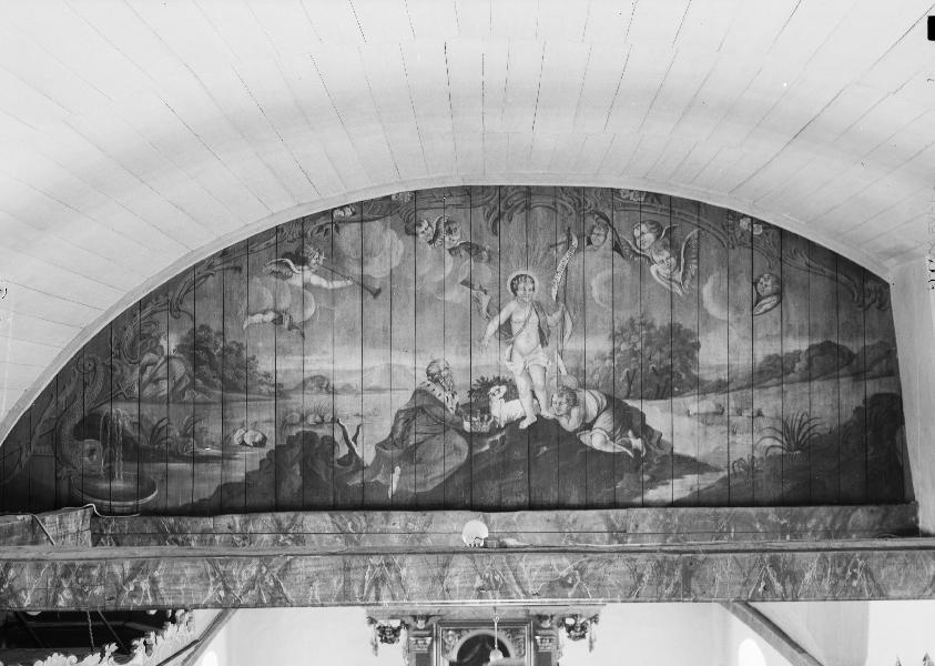 Takmålning, långhusets östra vägg. Kategori: (03) Målningar på träTakmålning, långhusets östra vägg.